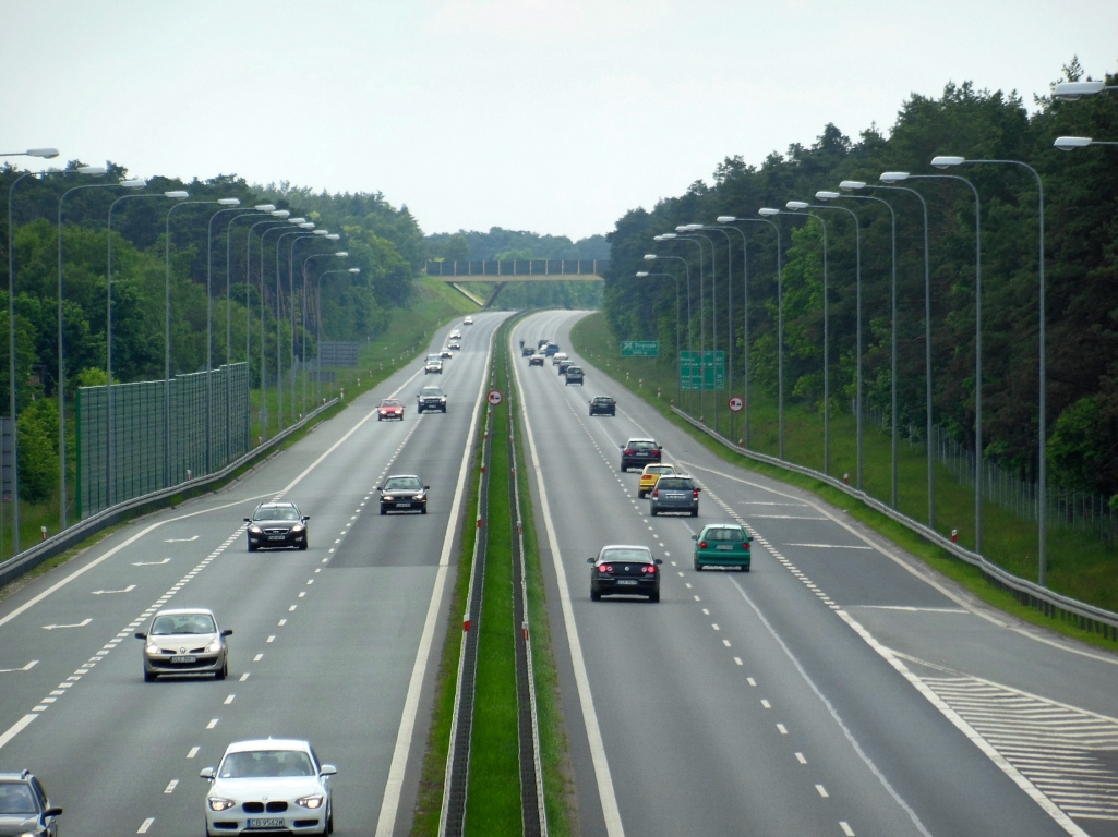 Droga krajowa nr 5 i 25, przebudowana w 2007 roku do parametrów drogi ekspresowej S5 na odcinku Węzeł Lotnisko - Węzeł Bydgoszcz Południe